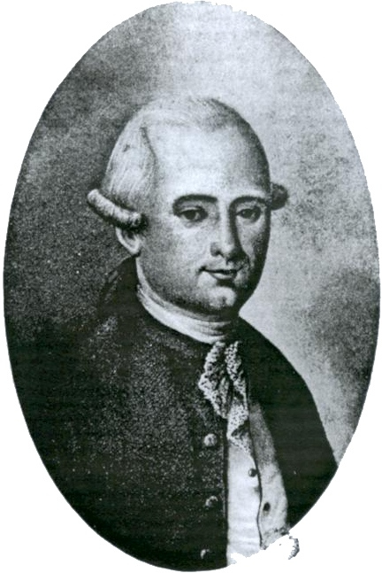 Portrait de Maurice-Augustin Montgolfier, papetier à Rives (France) dans la deuxième moitié du XVIIIe siècle